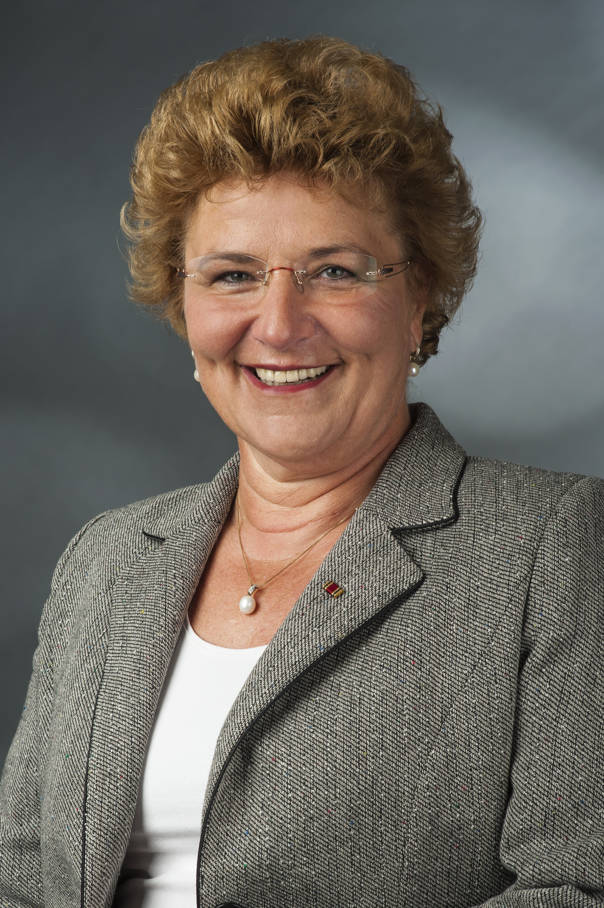 Sylvia Pantel (* 1. Januar 1961 in Düsseldorf) ist eine deutsche Politikerin (CDU) und seit 2013 Mitglied des Bundestages.